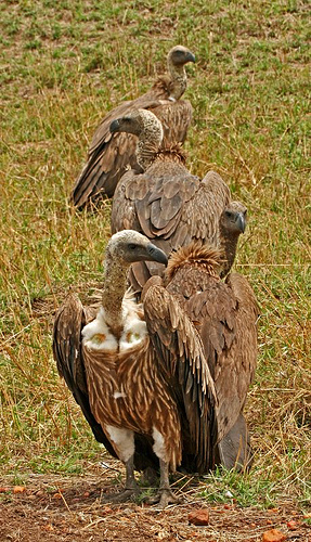 Grifone dorsobianco africano